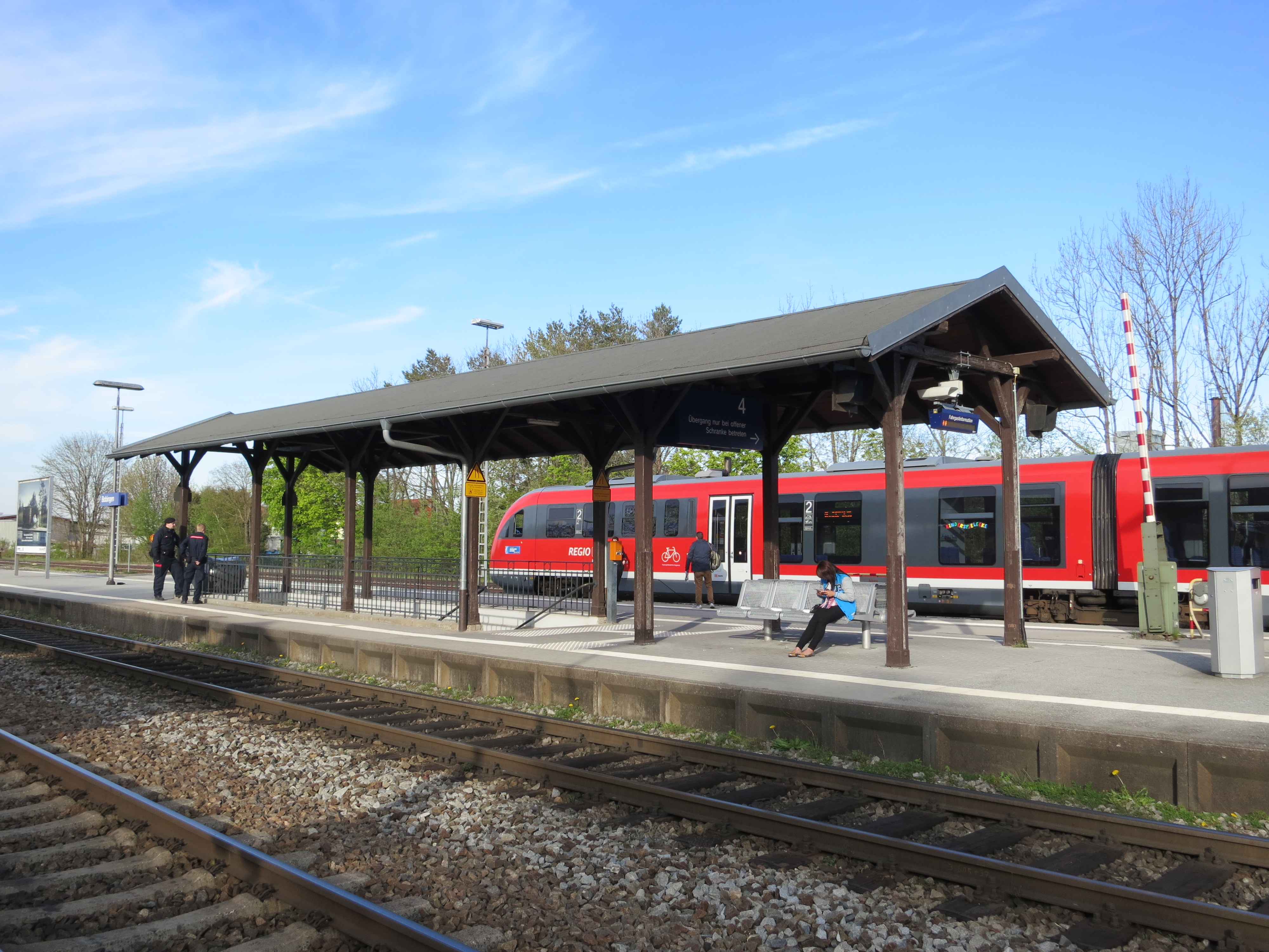 hölzerne Bahnsteigüberdachung von 1902 am Bahnhof Bobingen, im Hintergrund ein Triebwagen der Baureihe 642